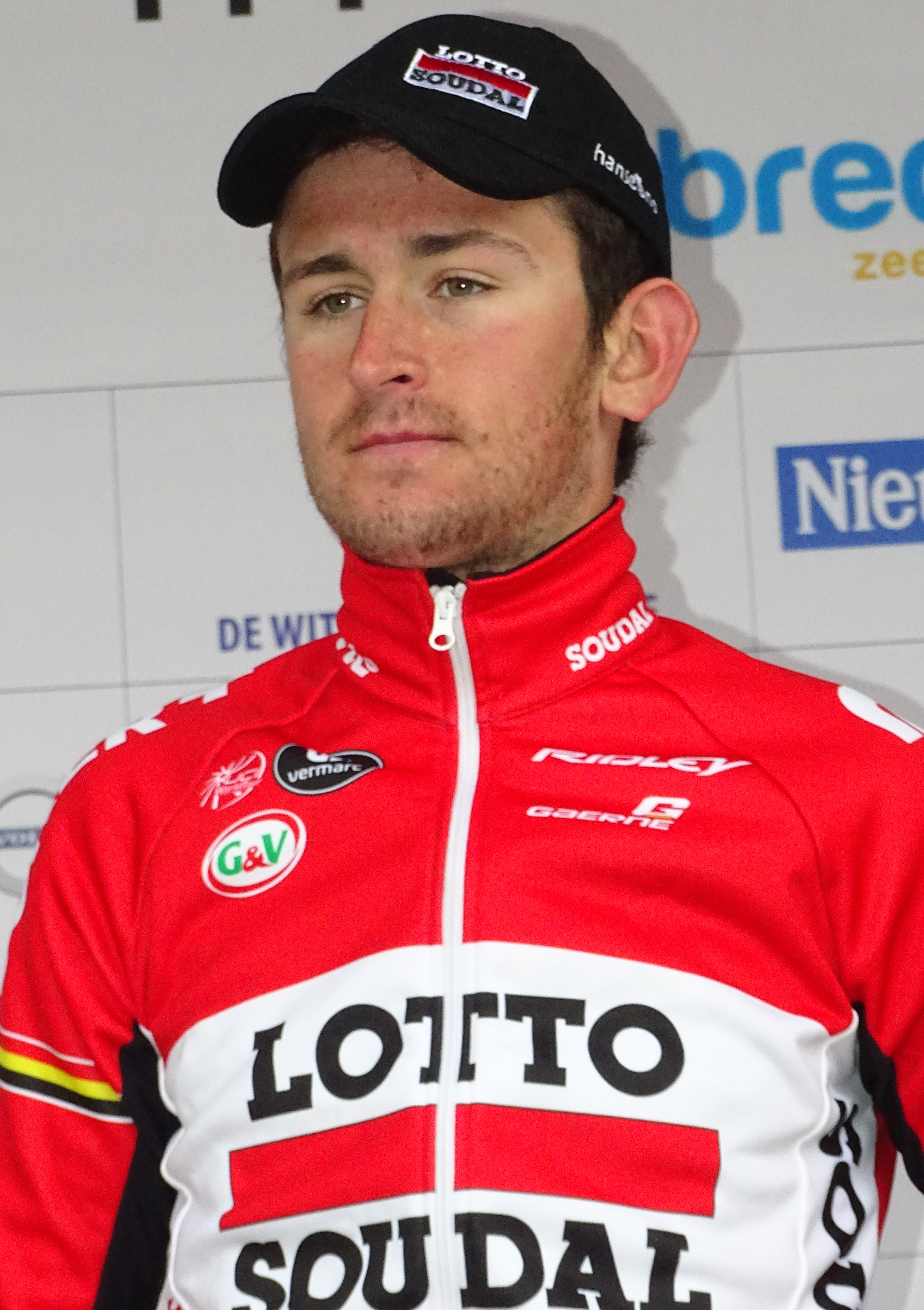 Reportage réalisé le vendredi 20 mars à l'occasion de l'arrivée de la Handzame Classic 2015 à Bredene (Kortemark), Belgique.